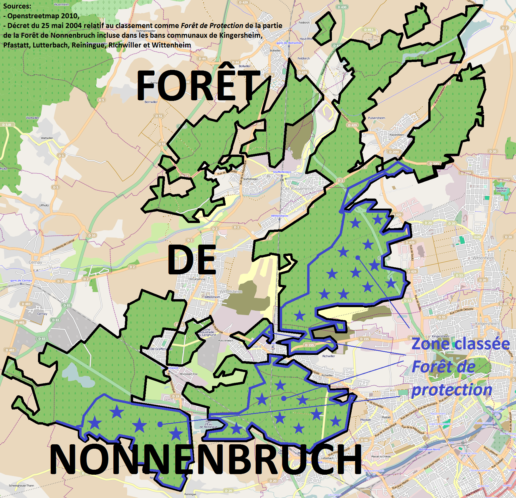 Forêt du Nonnenbruch avec mention de la zone de protection établie par le décret du 25 mai 2004. Fond de carte issu d'Openstreetmap.